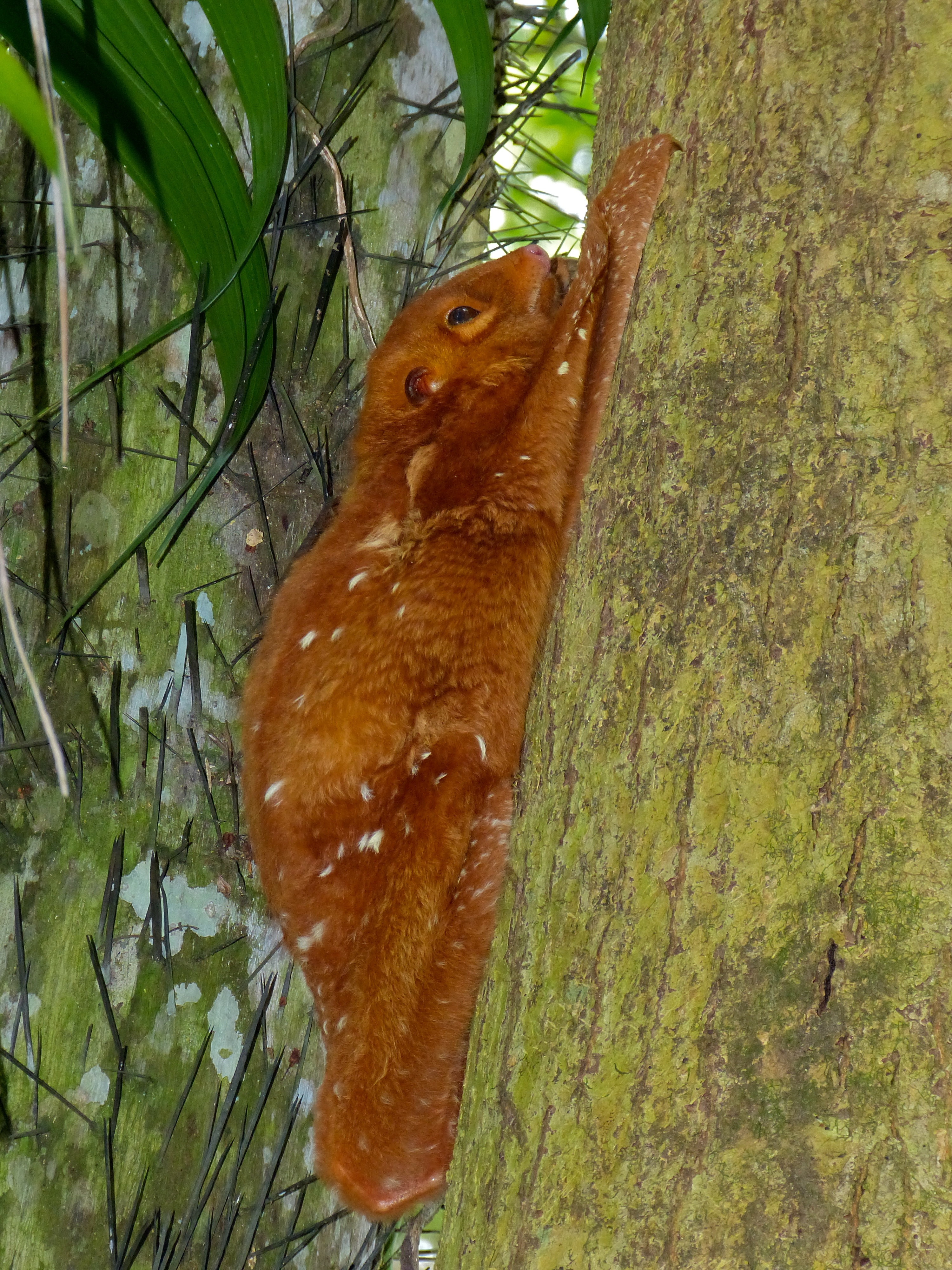 Bako NP, Sarawak, MALAYSIA